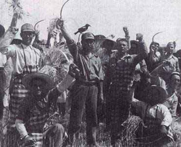 Campesinos de Badajoz llevando a cabo las ocupaciones de fincas en Marzo de 1936.